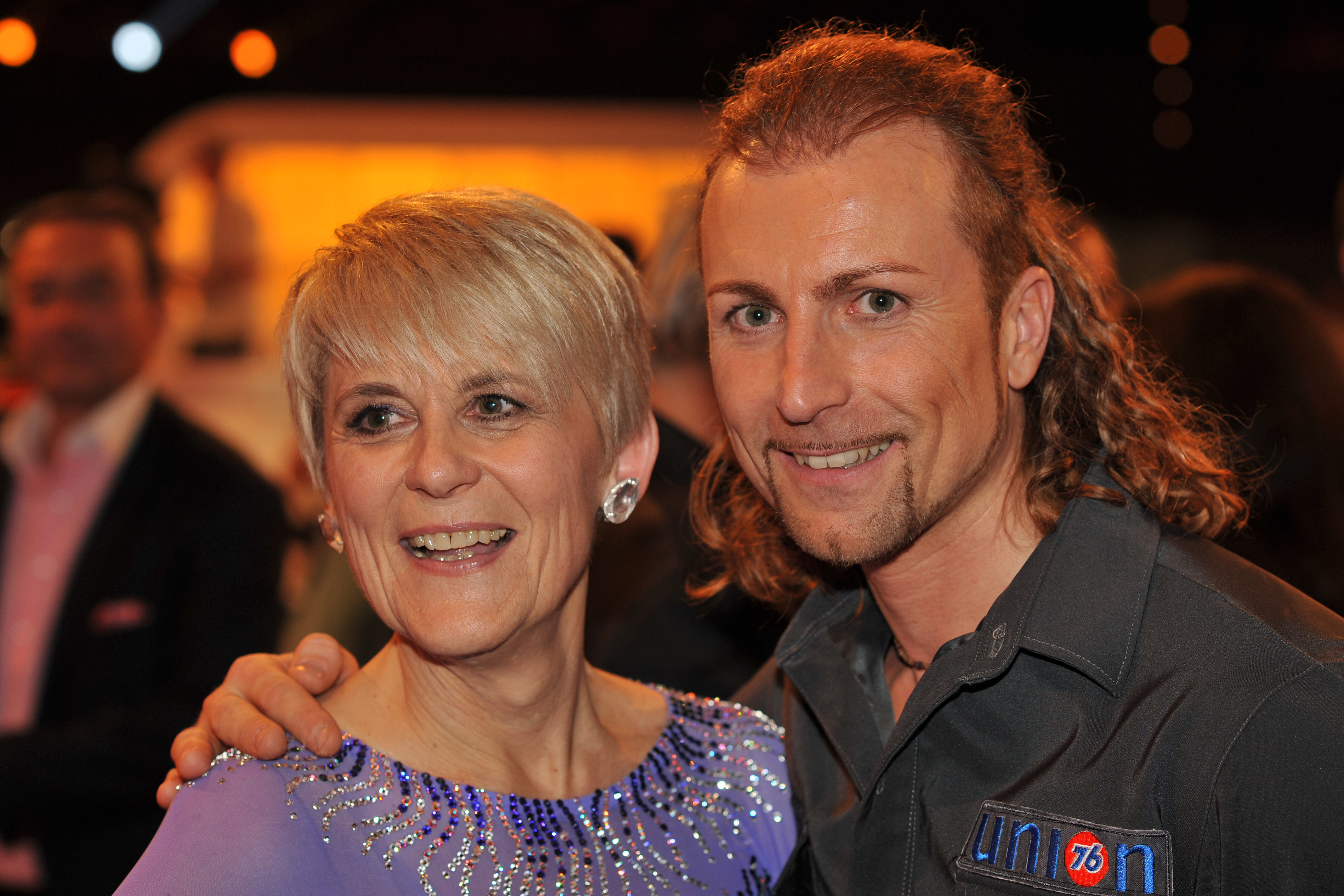 "Dancing Stars" am 21. März 2014: Lisbeth Bischoff und Gerhard Egger